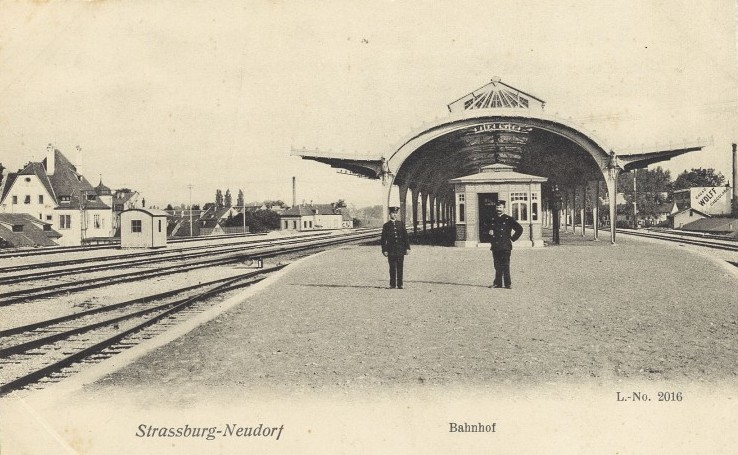 L'ancienne gare de Strasbourg-Neudorf.